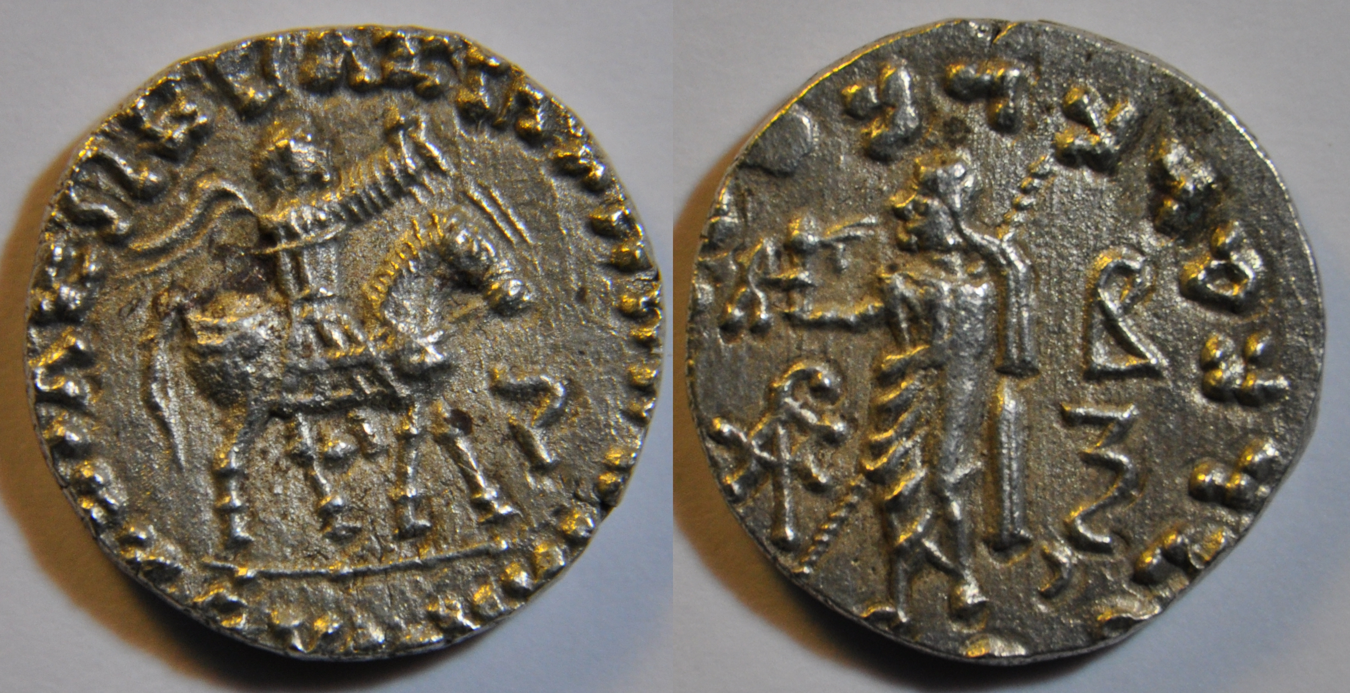 Une drachme en argent du roi Azes II de la dynastie Indo-Scythe : A/ Roi cavalier tenant un fouet passant à droite; devant les jambes du cheval à droite, l'akshara sa (alphabet kharoshthi) Légende (visible) en grec : (ΒΑΣΙ)ΛΕΩΣ ΒΑΣΙΛ(ΕΩΝ ΜΕΓΑΛΟΥ / ΑΖΟΥ) R/ Zeus debout tourné à gauche tenant dans la main droite une Nikè et dans la gauche un long sceptre. Légende en kharoshthi : (maha)rajasa rajarajasa (mahatasa / ayasa). Devant Zeus en bas à gauche, monogramme; à droite, en haut monogramme et en bas lettre kharoshthi dhra. Mitchiner attribue ce type de monnaie à l'atelier de Chah du Nord. Dimension : 14.79 mm Poids : 2.4 g. Référence : je n'ai pas pour l'instant trouvé de référence avec la combinaison du revers. Dans les combinaisons actuelles, le monogramme du haut à droite n'est pas associé avec celui du bas à gauche ni avec la lettre du bas à droite. Coins of the Indo-Scythians